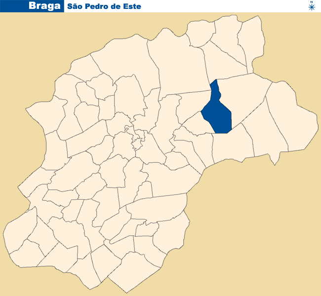 Localização de São Pedro de Este no concelho de Braga.